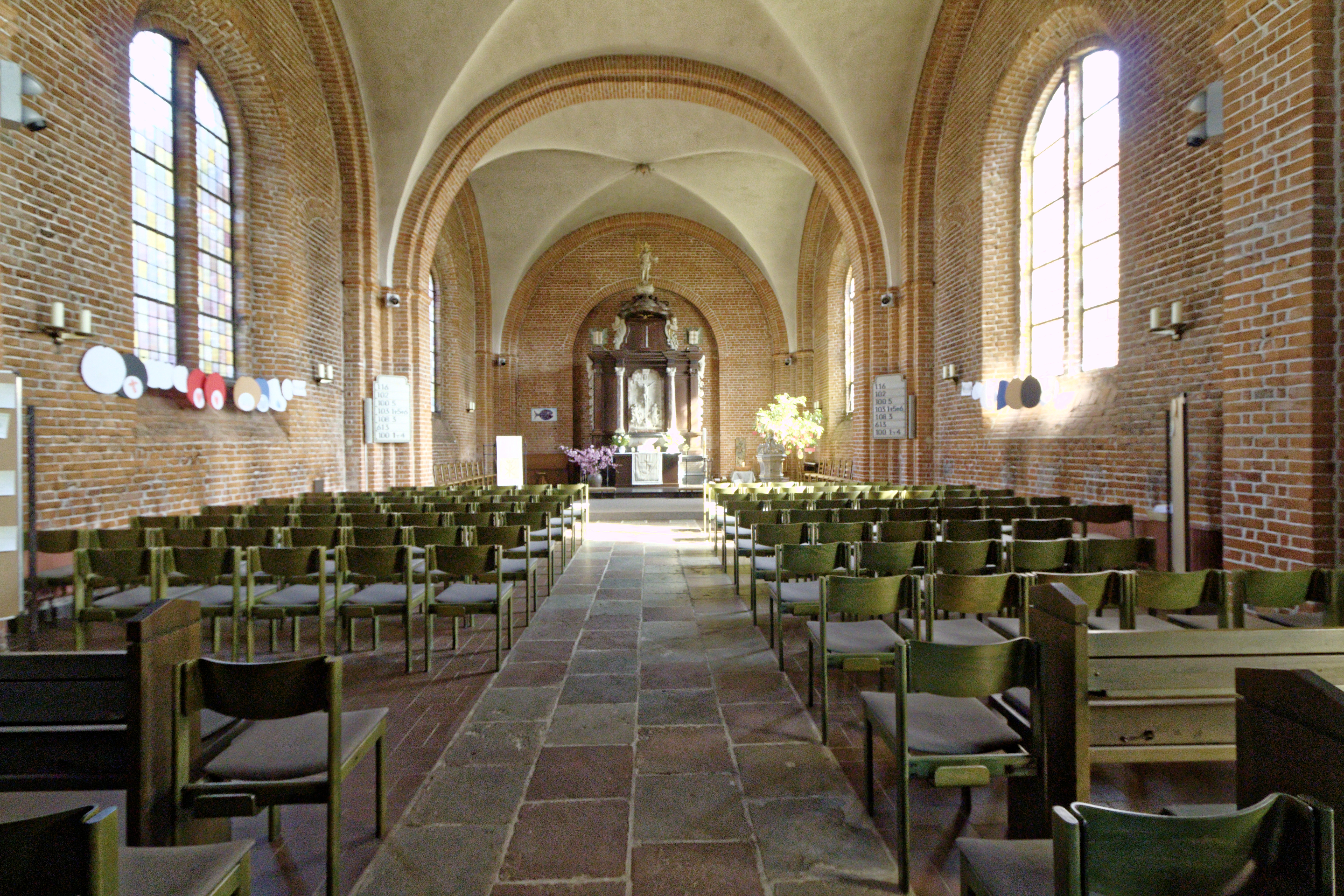 Krusendorf, Kirche St.Trinitatis; Innenausstattung